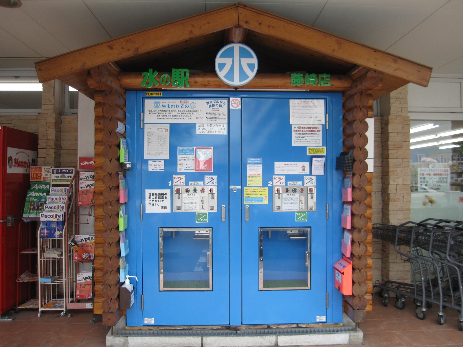 マミーズ紅葉店の水の駅藤崎店